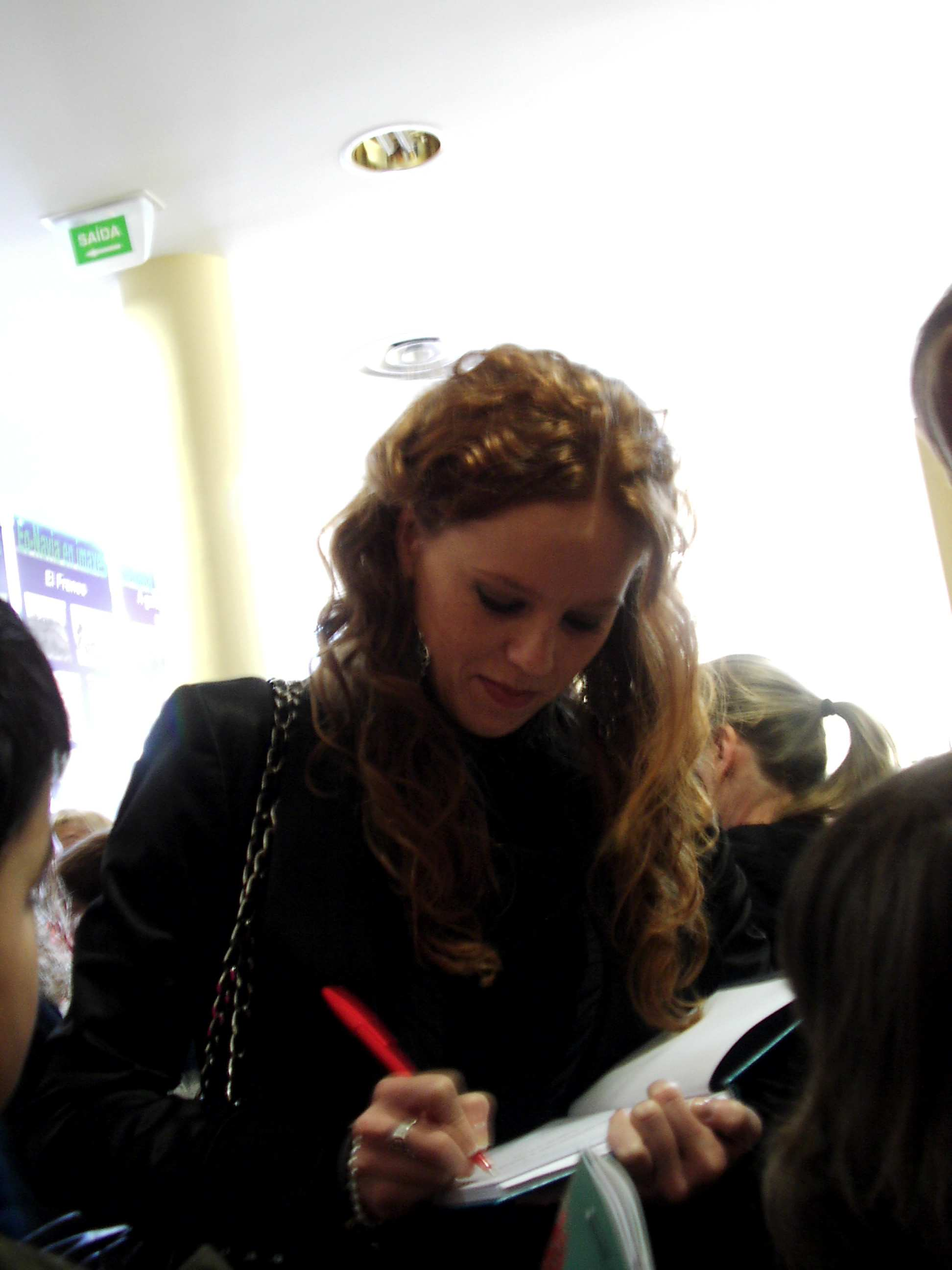 María Castro asinando un autógrafo no marco da presentación de 'Os mortos van á présa' en Ribadeo